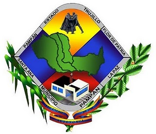 Imagen del escudo del municipio Pampán, del estado Trujillo, en Venezuela. [1]